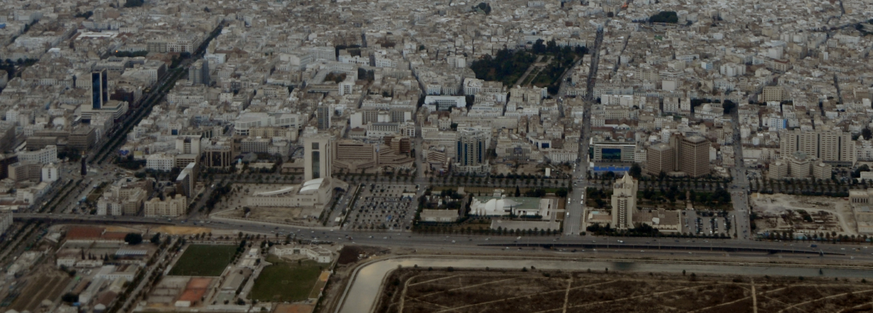 Panoramique sur l'avenue Mohamed V de Tunis (Tunisie)